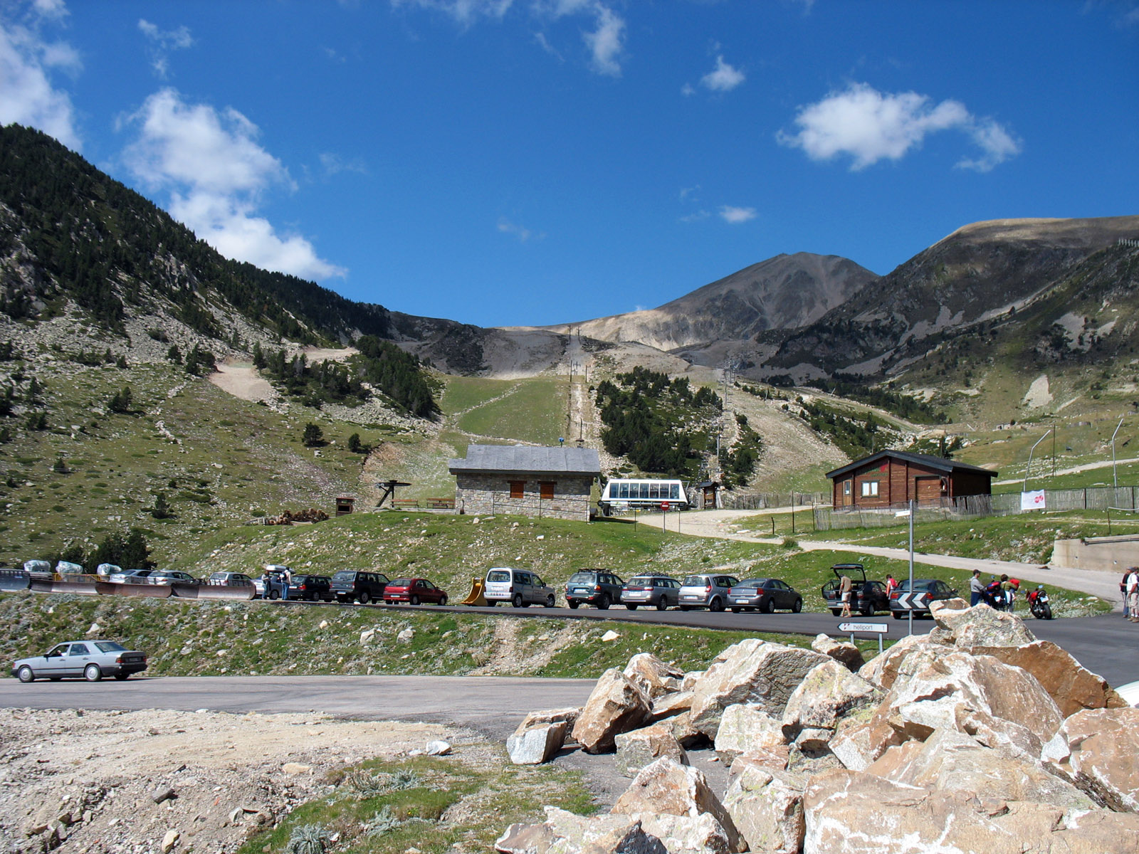 Estació d'esquí de Vallter 2000. Al fons a la dreta es veu el Bastiments, el punt més alt del terme de Setcases Autor:Monster1000 Catalunya agost 2006